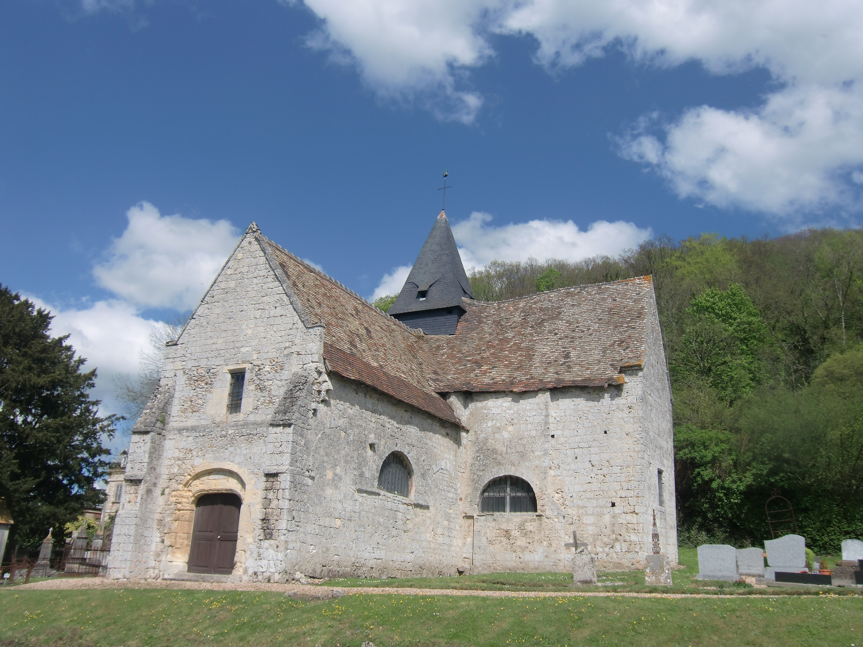 Eglise de Fiquefleur (Eure - Normandie - France)